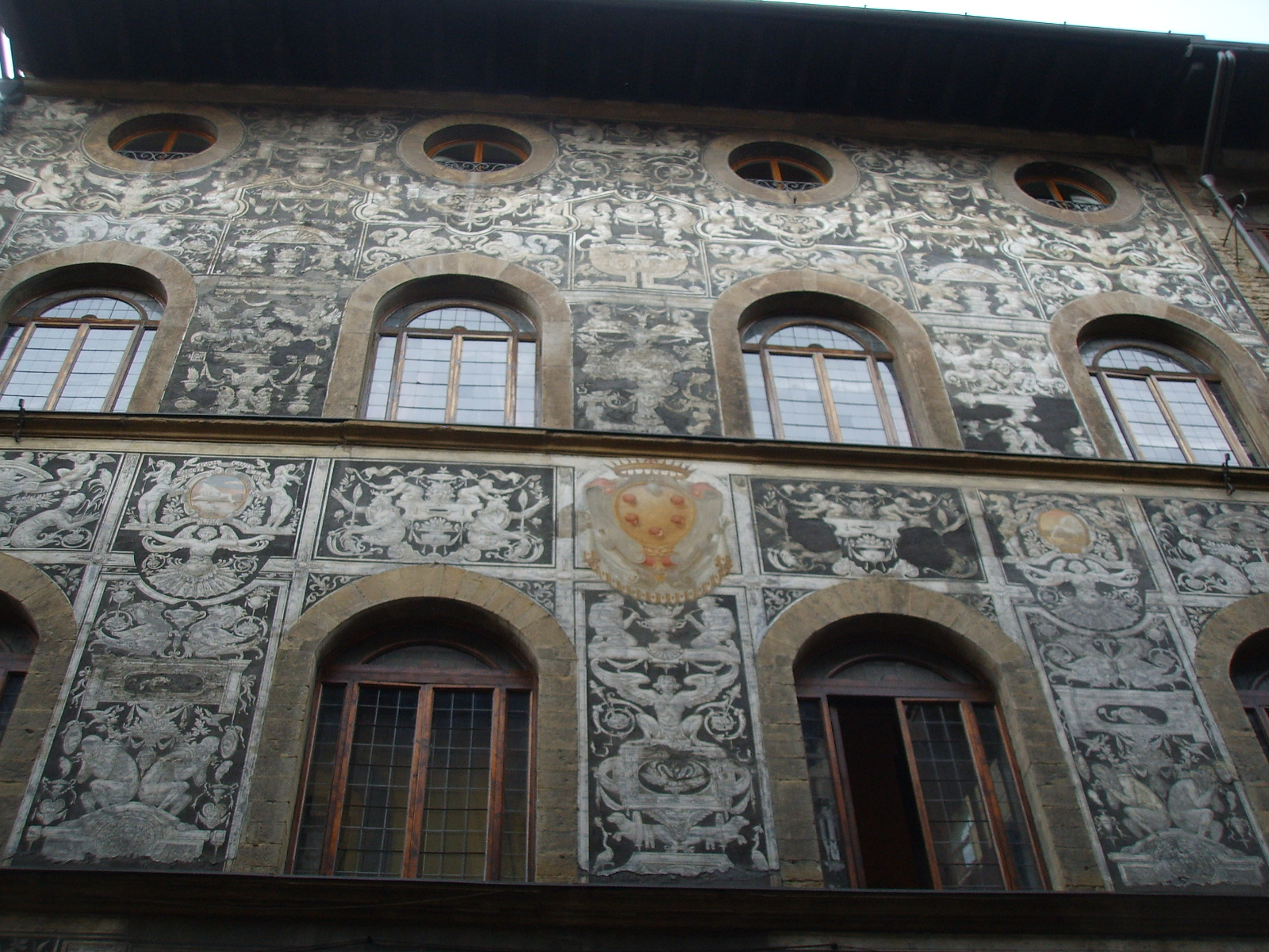 Palazzo di bianca cappello, graffiti